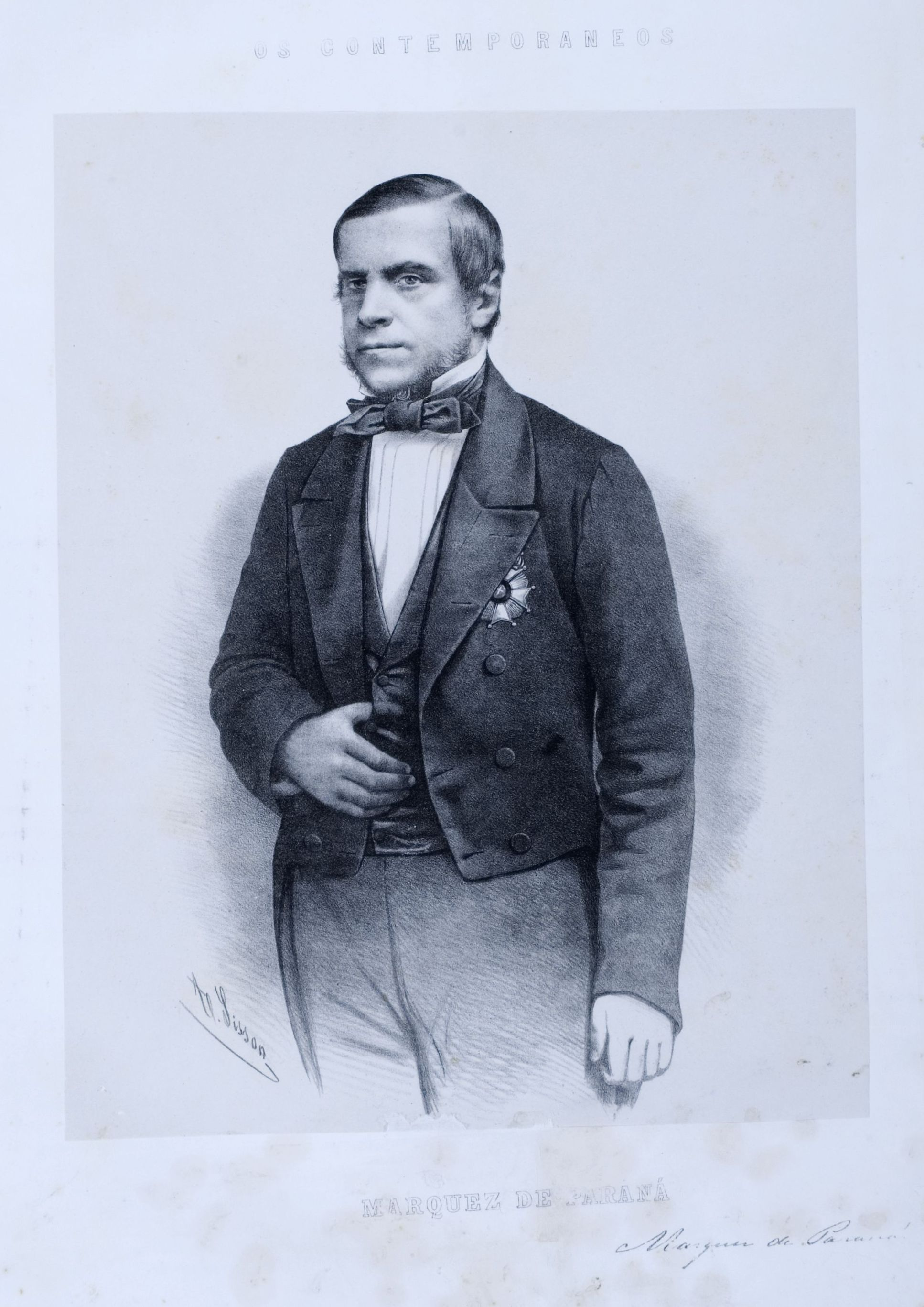 Litografia em preto e branco